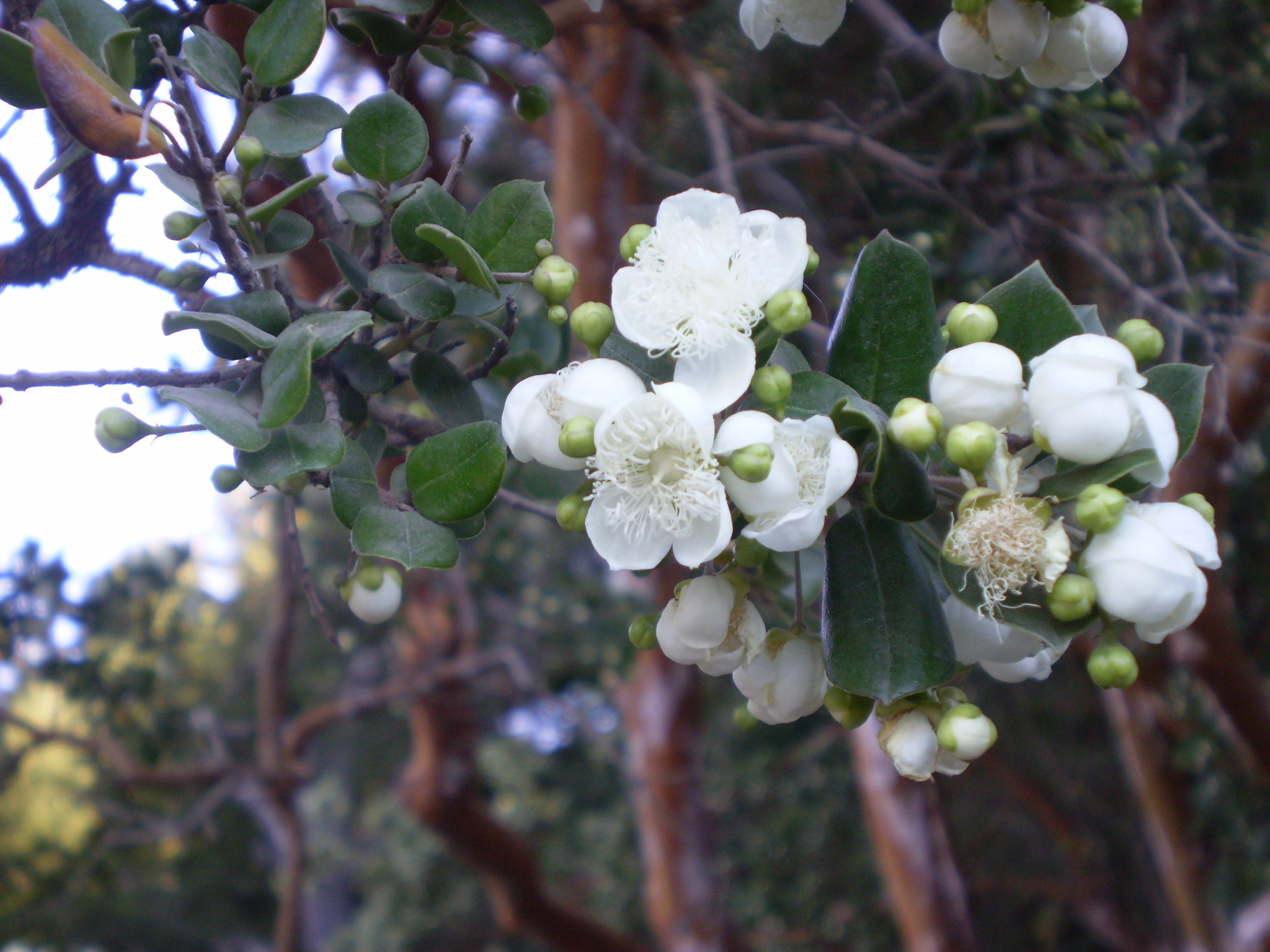 Flor del Arrayán. Villa La Angostura, Neuquén, Argentina